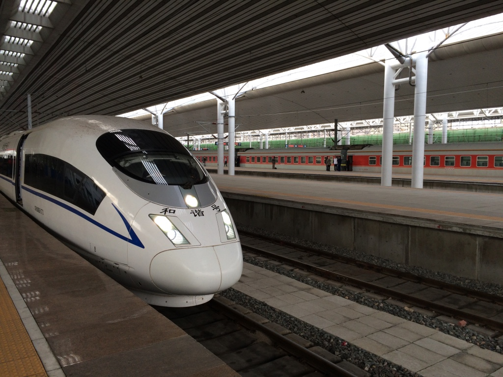 中文（中国大陆）: G398次列车停靠于丹东站1站台